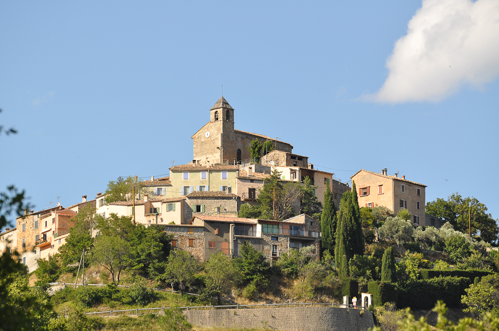 Castellet-lès-Sausses, le village